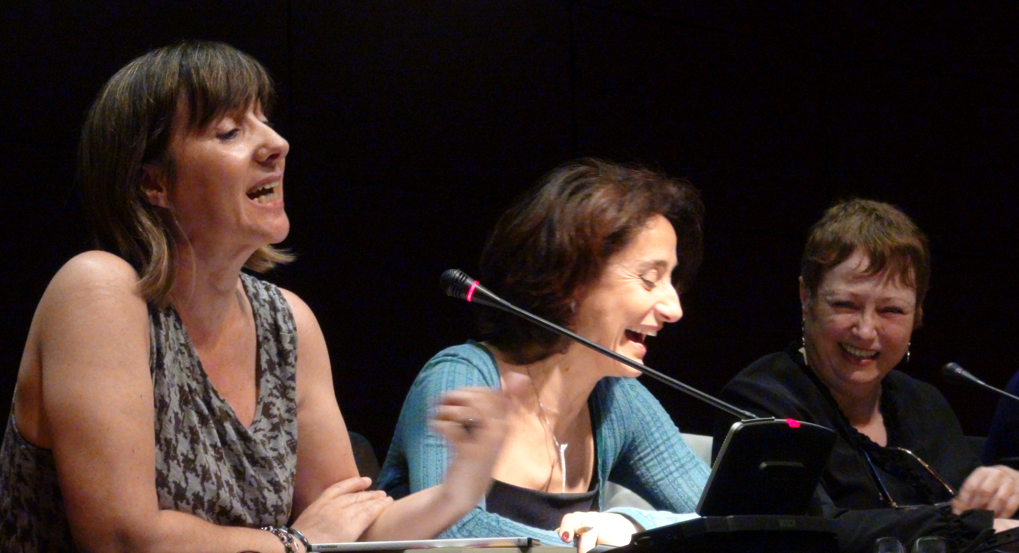 Celebración del 20 Aniversario del Curso de Teoría Feminista